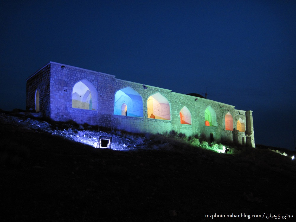 نمای قدمگاه جهرم